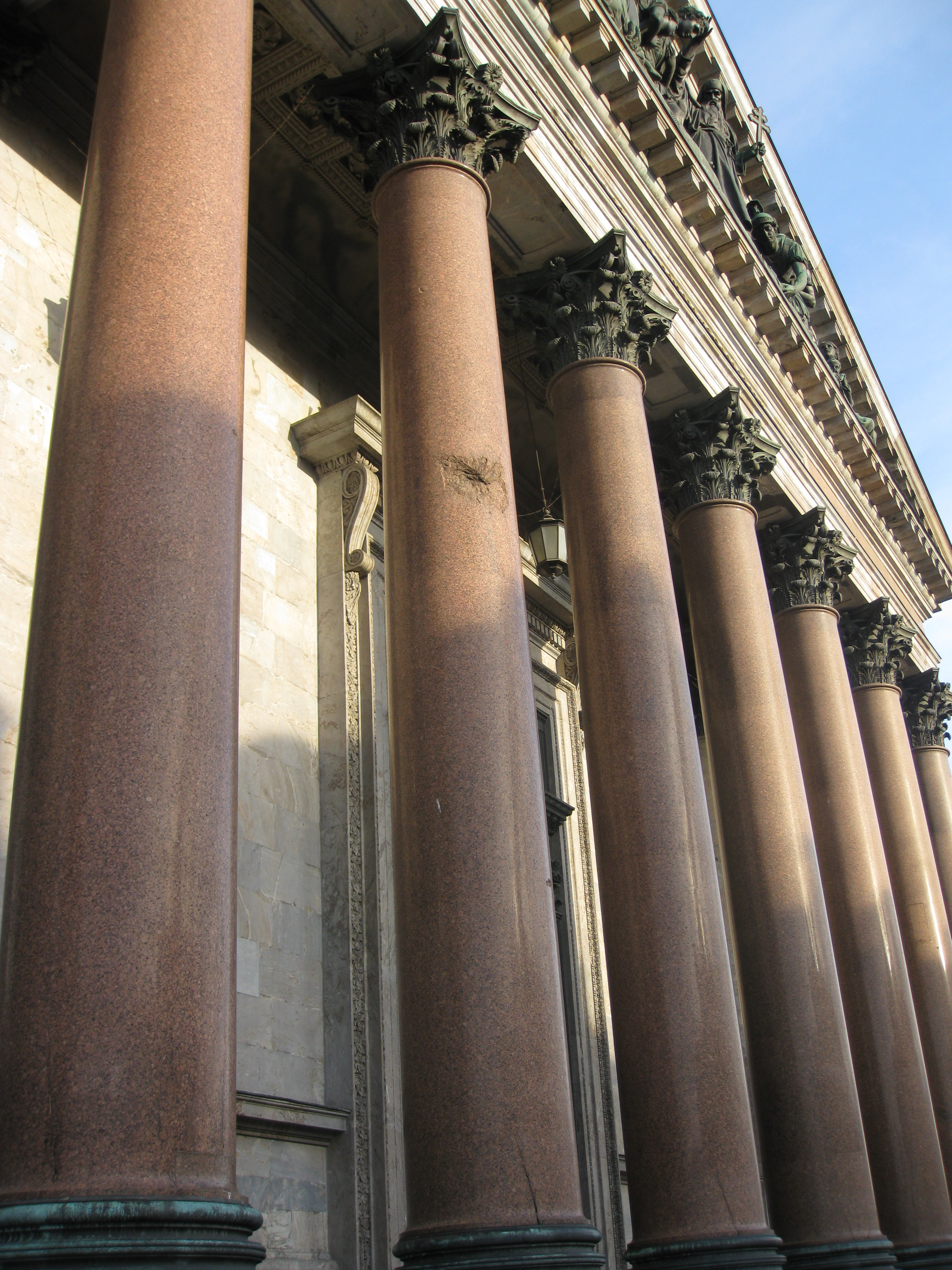 Saint Isaac's Cathedral קתדרלת יצחק הקדוש